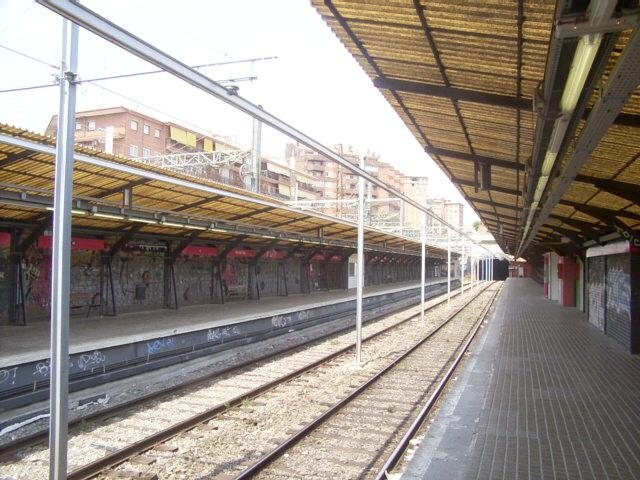 Platforms of Mercat Nou metro station, Barcelona/Andanes de l'estació Mercat Nou del metro de Barcelona